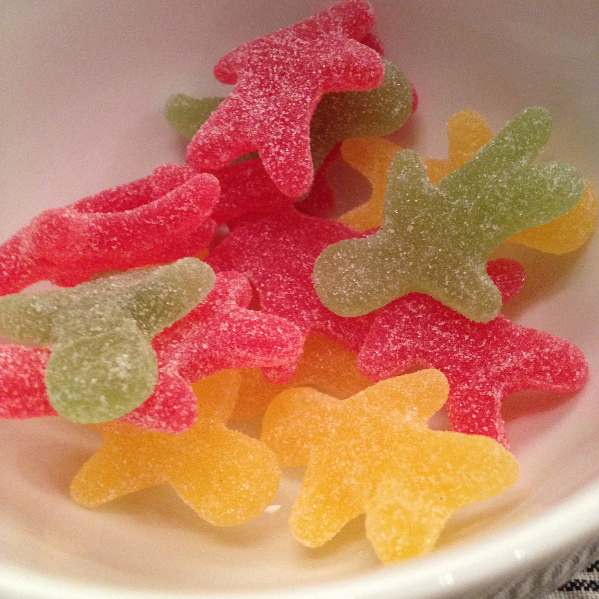 Coop seigmenn